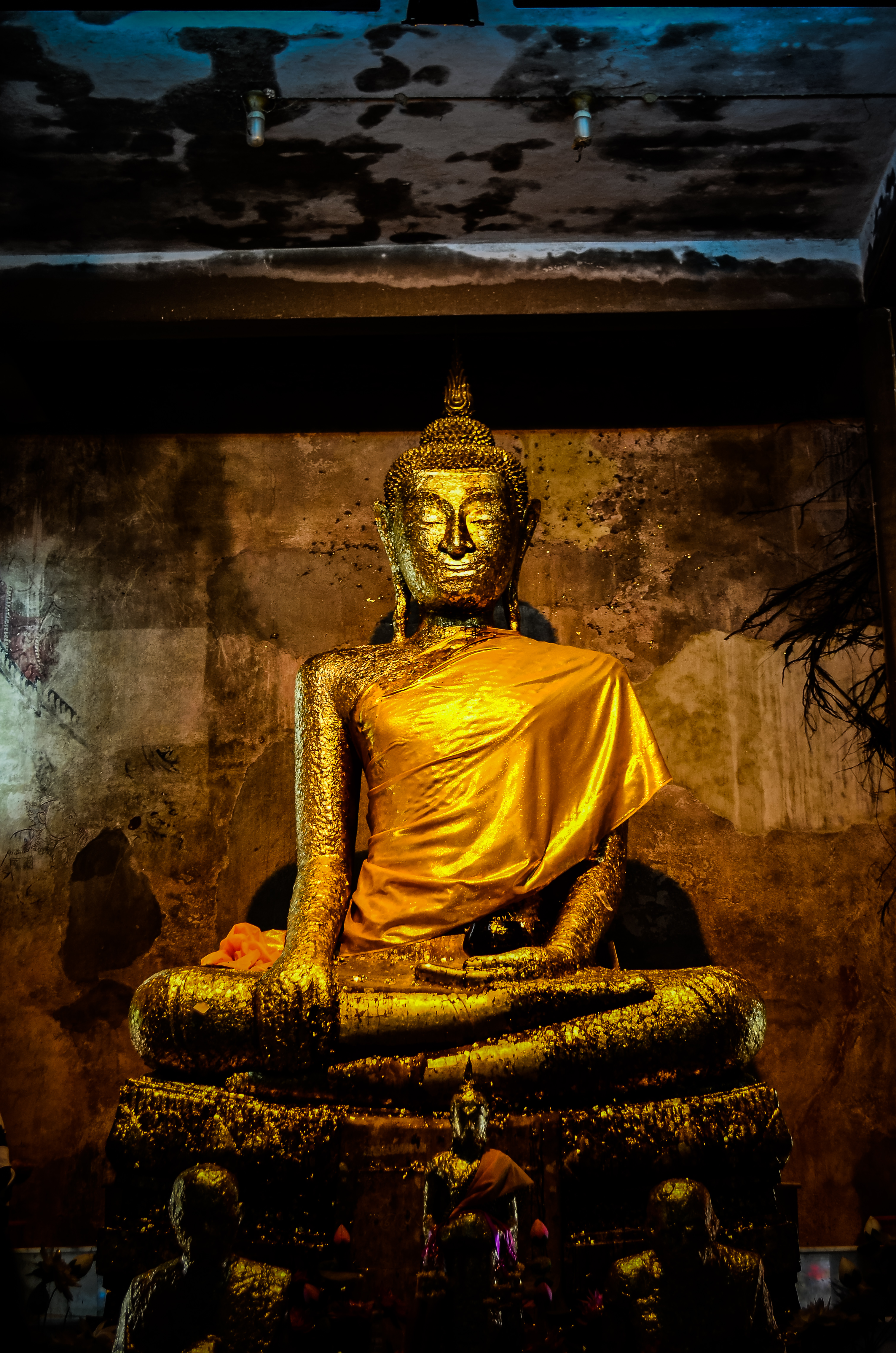 วัดบางกุ้ง